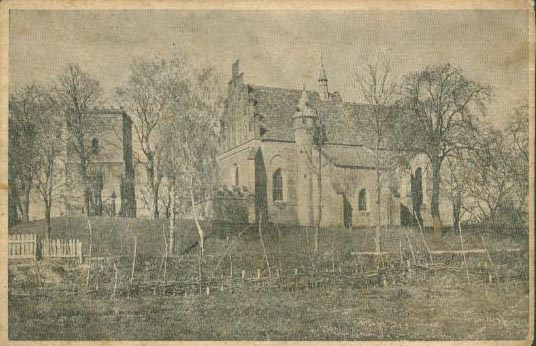 Felsztyn